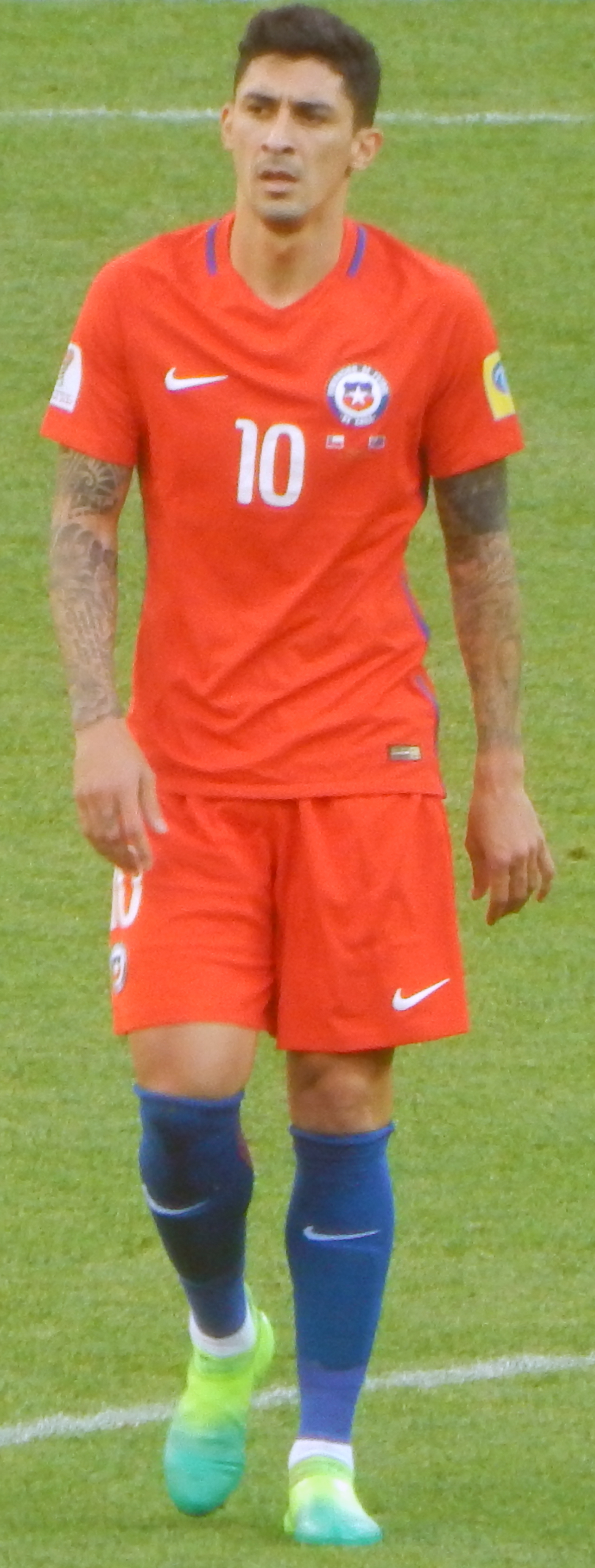 Пабло Эрнандес Матч Чили – Австралия